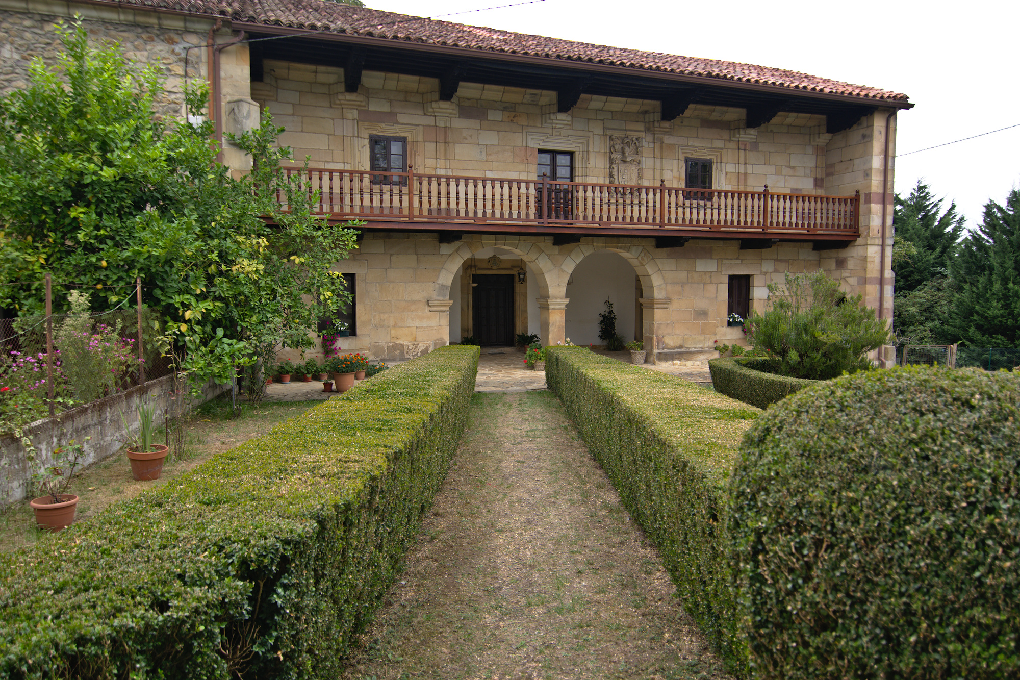 Casona de Calderón de la Barca